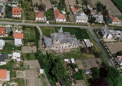 Táplánszentkereszt, Hungary, aerialphotography